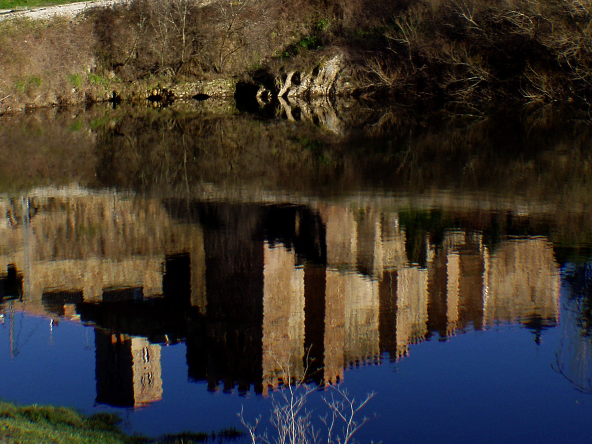 Las murallas de Buitrago y la torre de su iglesia reflejados en el río Lozoya